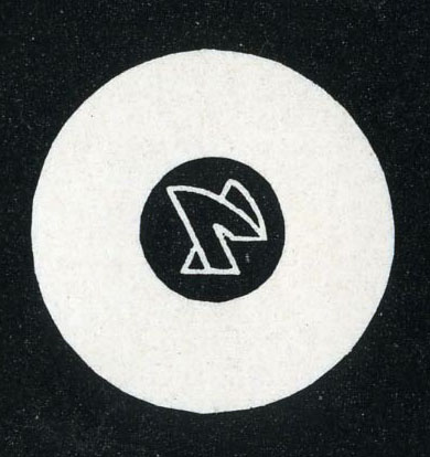 ЛОГО СПМ «Рекорд»